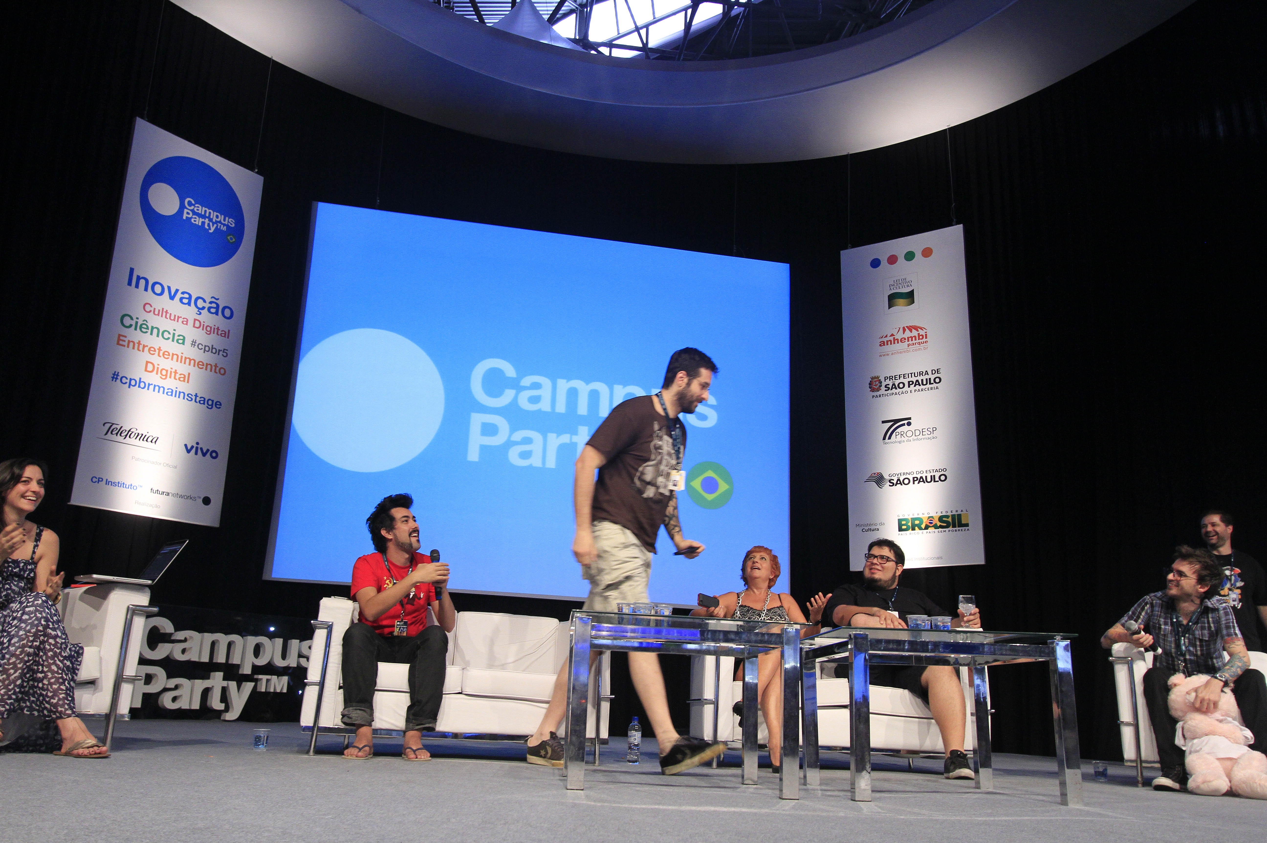 Rafinha Bastos, PC Siqueira, Rodrigo Fernandes (Jacaré Banguela), Mauricio Cid (Não Salvo) e Rosana Hermann (Querido Leitor) no palco principal do Campus Party Brasil 2012. Foto: Cristiano Santanna.